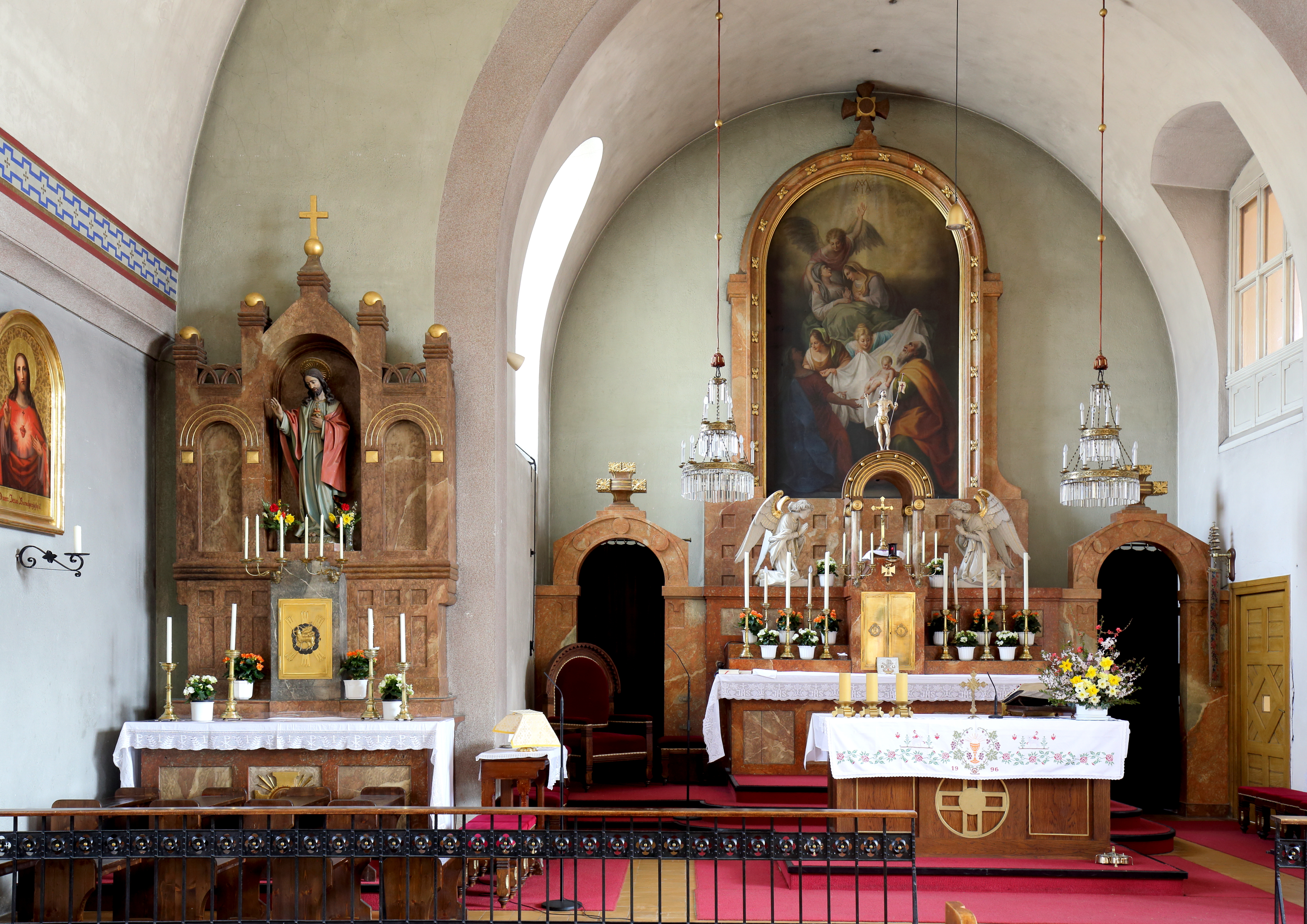 Hochaltar und linker Seitenalter der katholischen Pfarrkirche Maria Geburt in der niederösterreichischen Marktgemeinde Enzersfeld im Weinviertel.